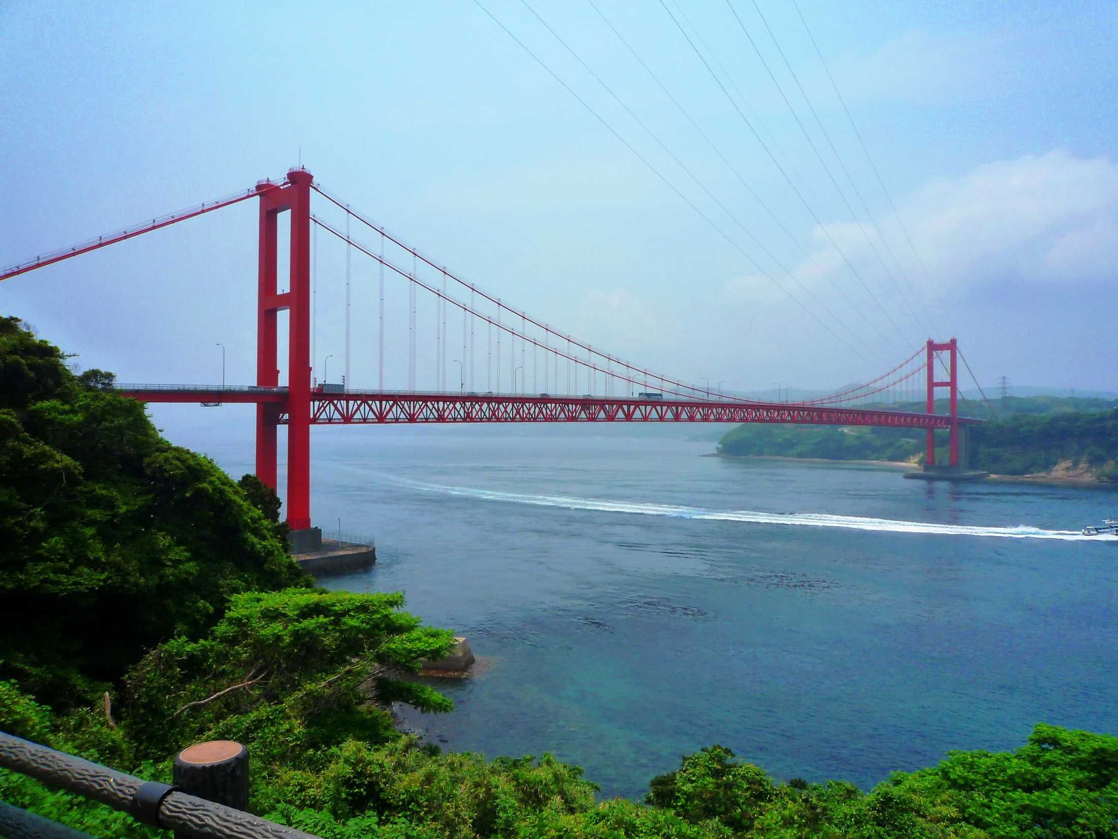 平戸大橋・遠景（本土部側より撮影）